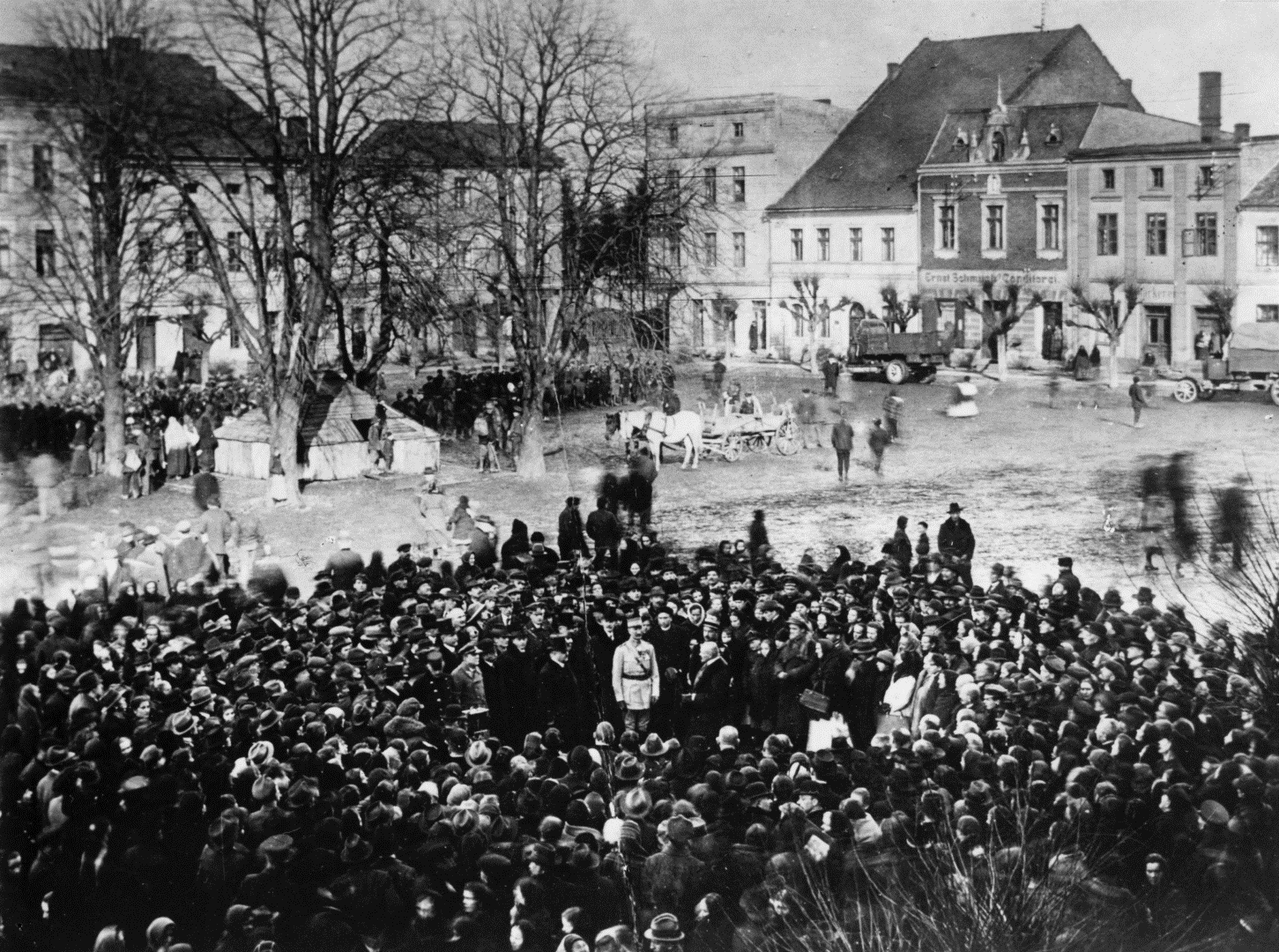 Převzetí Hlučínska československou armádou a úřady 4. 2. 1920 v 11 hodin na náměstí v Hlučíně